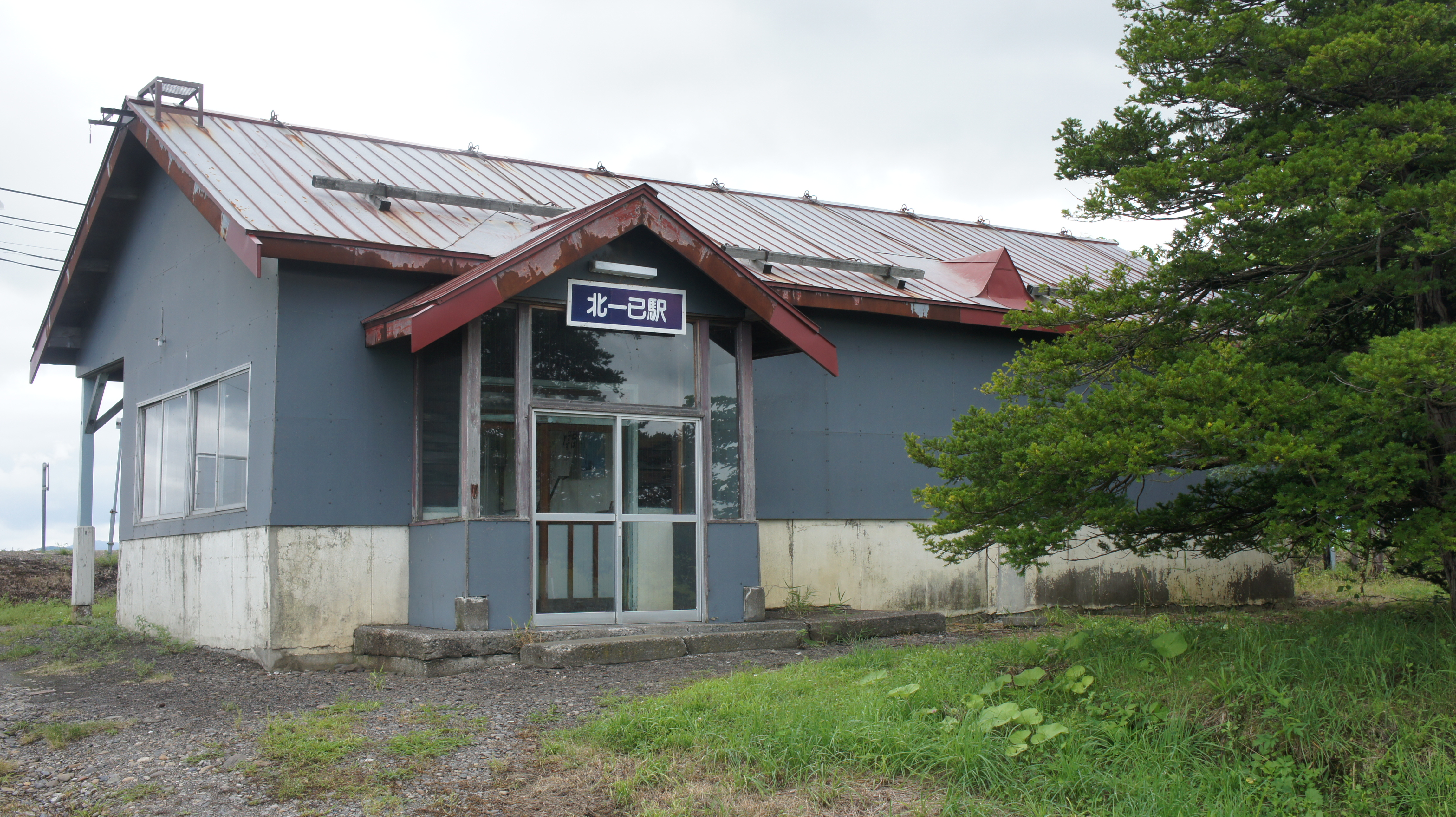 JR留萌本線・北一已駅の駅舎